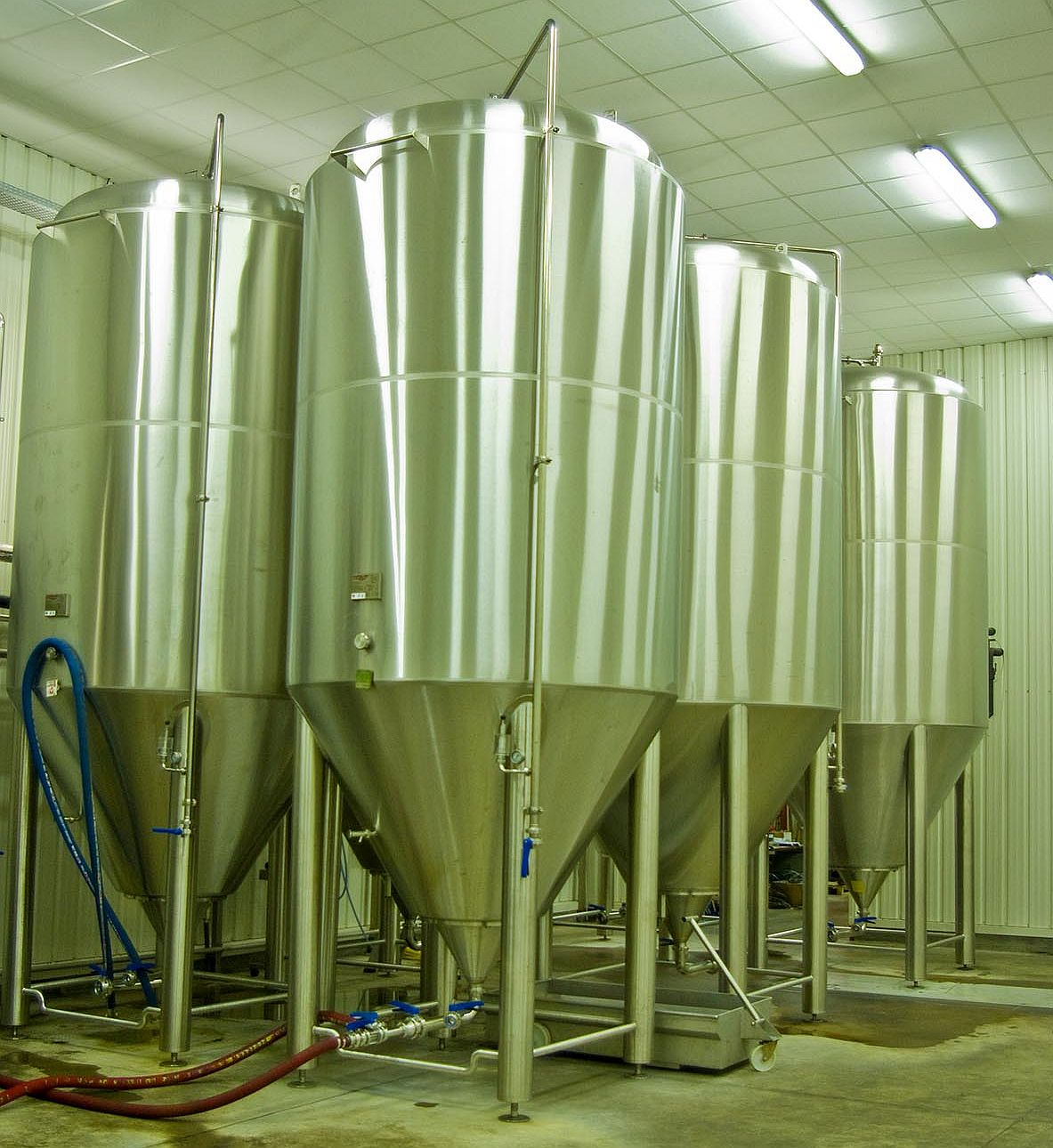 Zylindrokonische Edelstahl-Bierlagertanks einer Kleinbrauerei